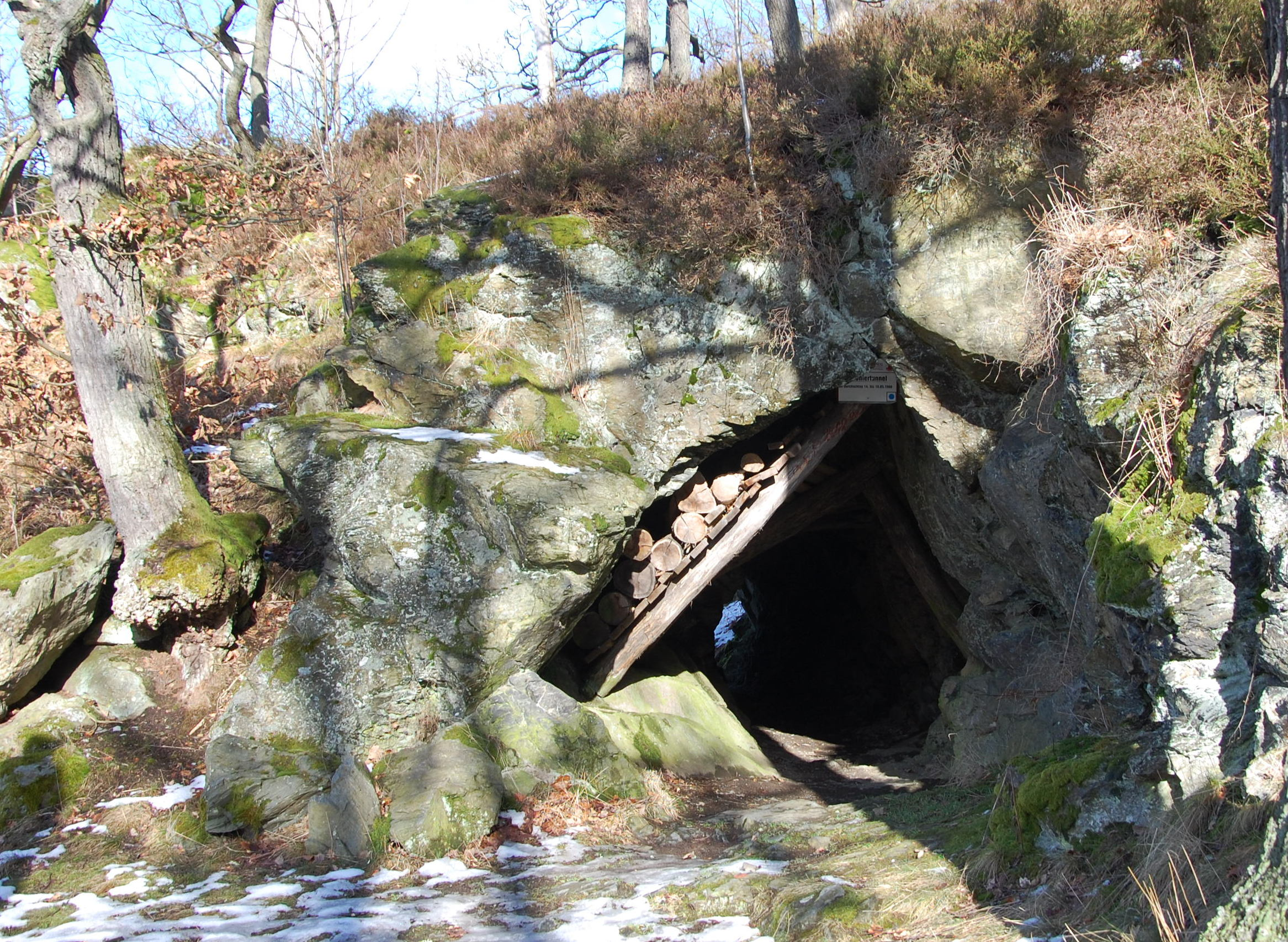 Pioniertunnel am Selketal